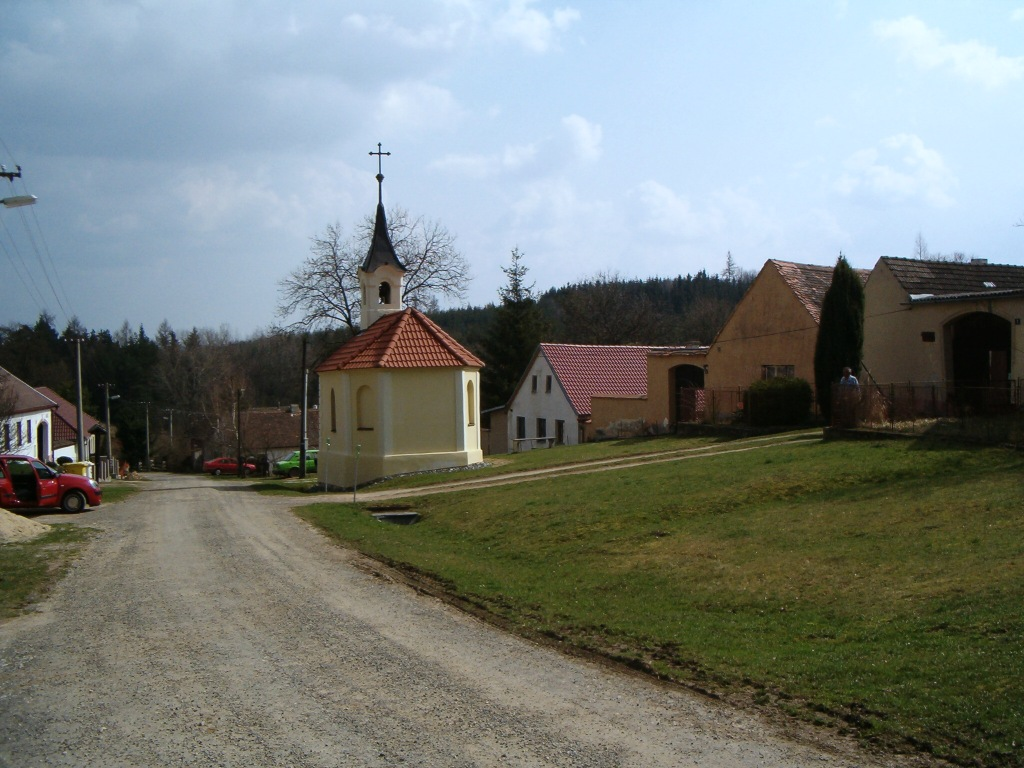 Náves ve Václavově